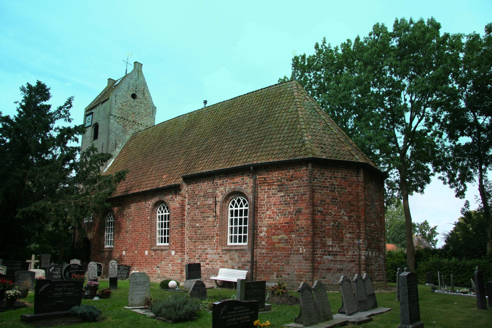 Kerkje Wijns